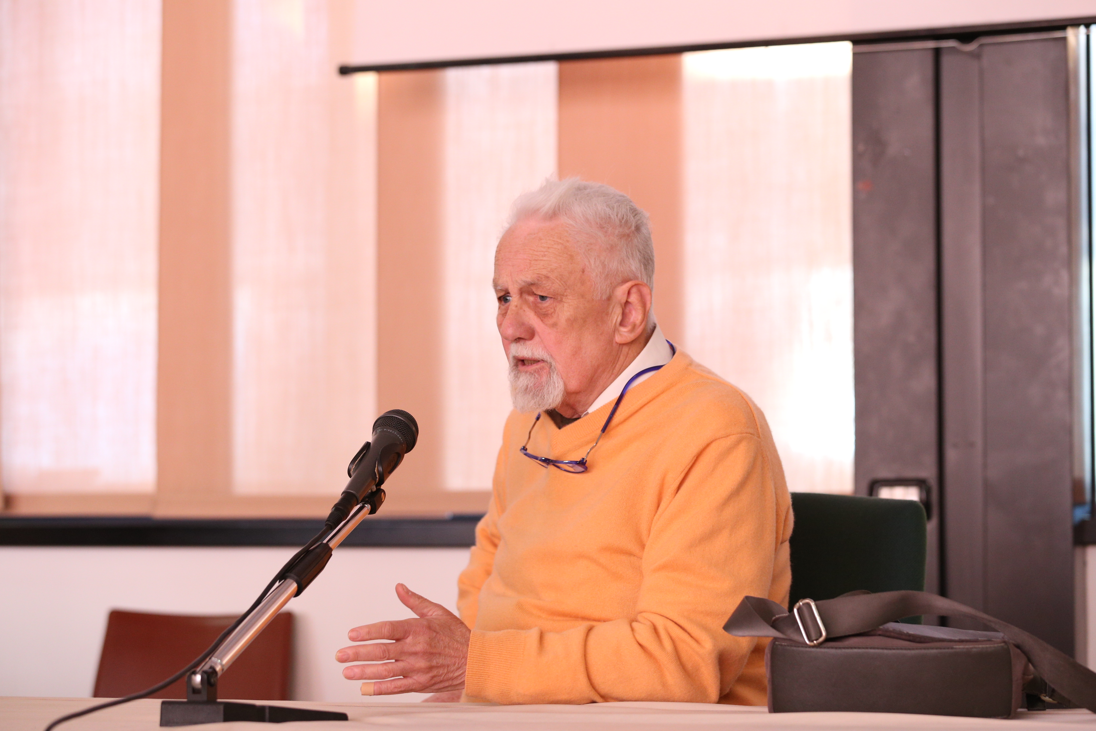 John Bassett Trumper - Convegno "Le telefonate", Arcavacata di Rende (CS)